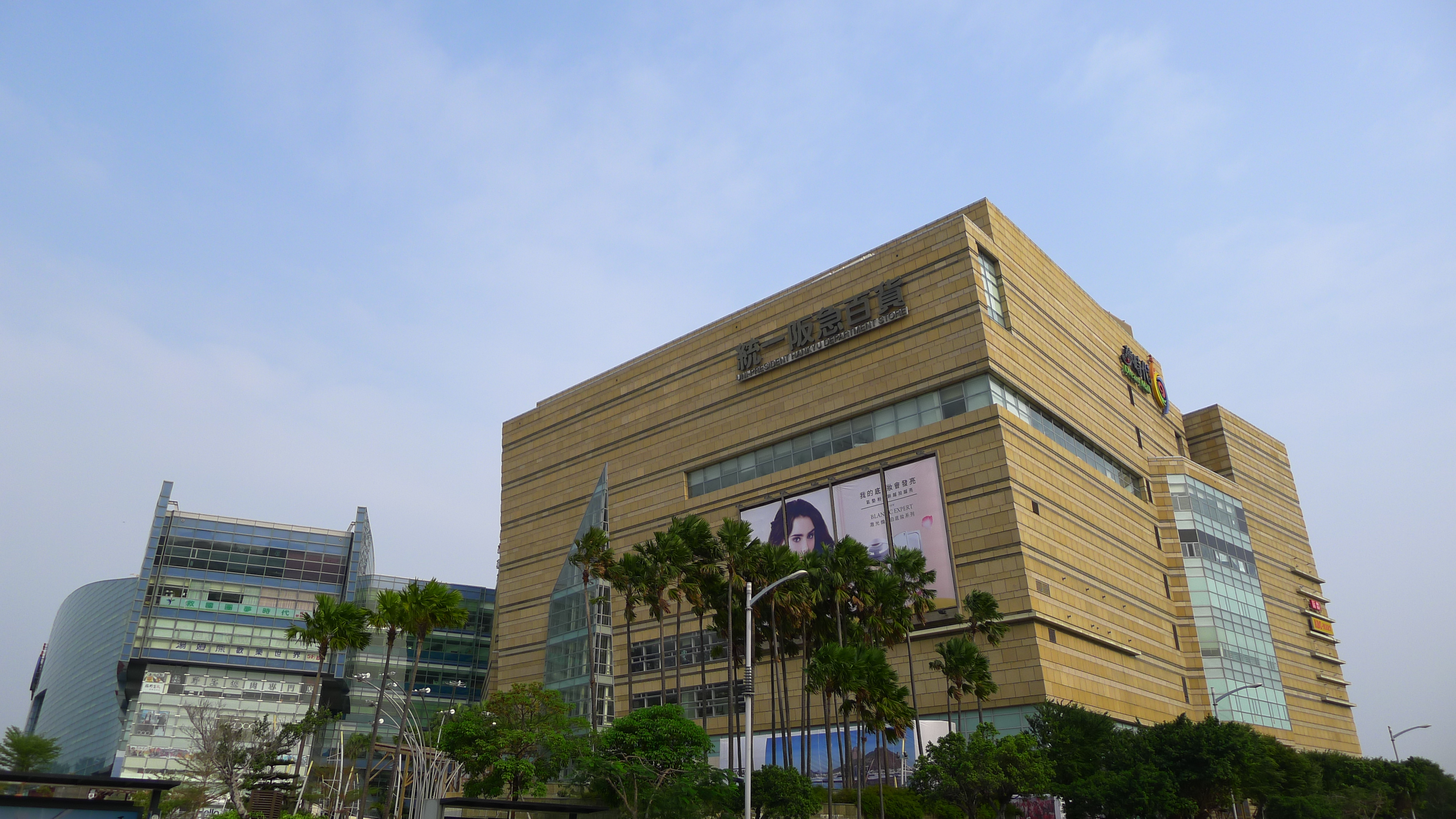 中文（台灣）: 統一時代百貨高雄店與高雄捷運輕軌電聯車。